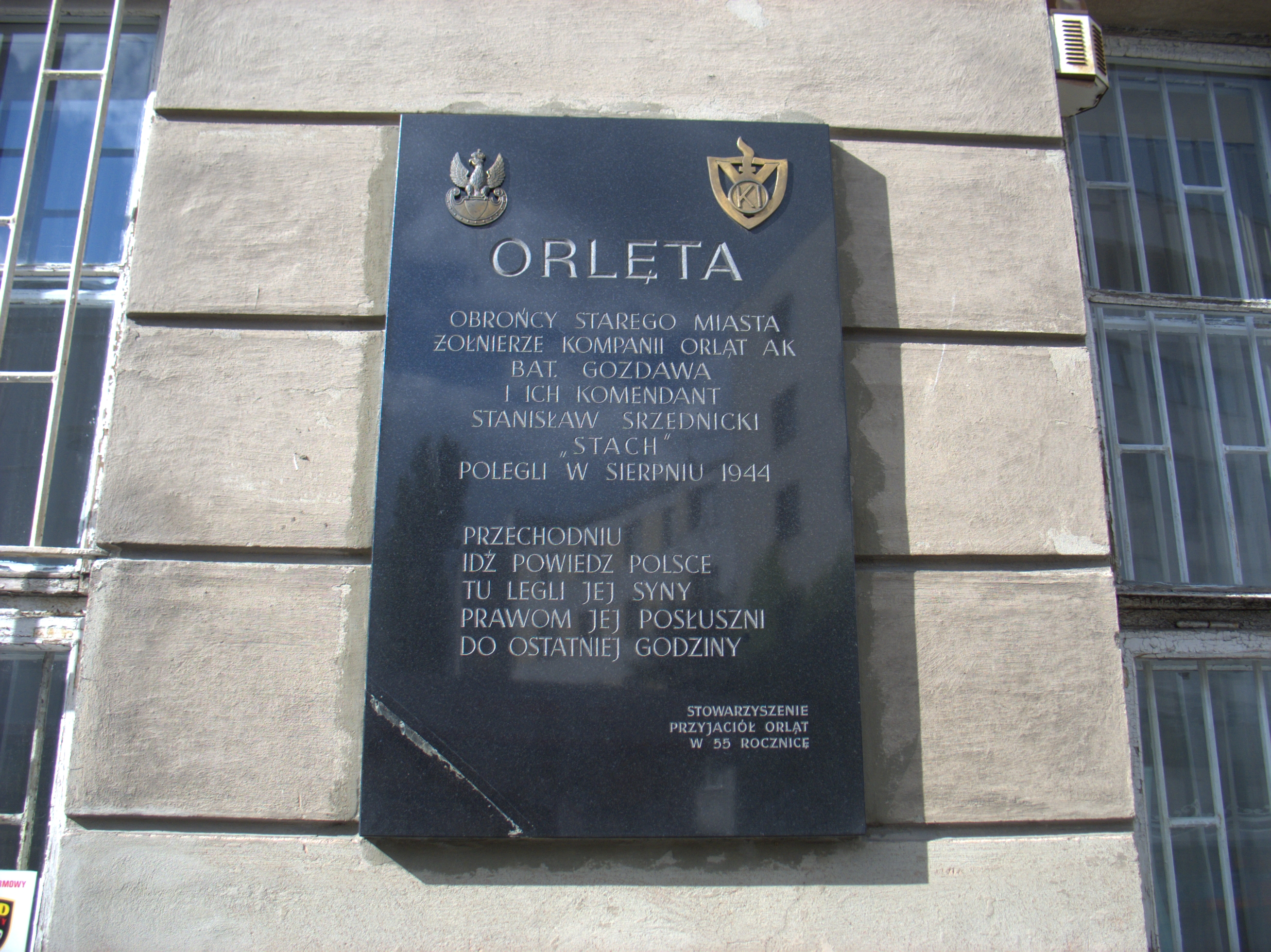 Orlęta - tablica informacyjna na budynku przy ul. Podwale w Warszawie. Tablica pamiątkowa przy ul. Kilińskiego poświęcona Stanisławowi Srzednickiemu i "Orlętom". Orlęta - tablica informacyjna na budynku przy ul. Podwale w Warszawie.